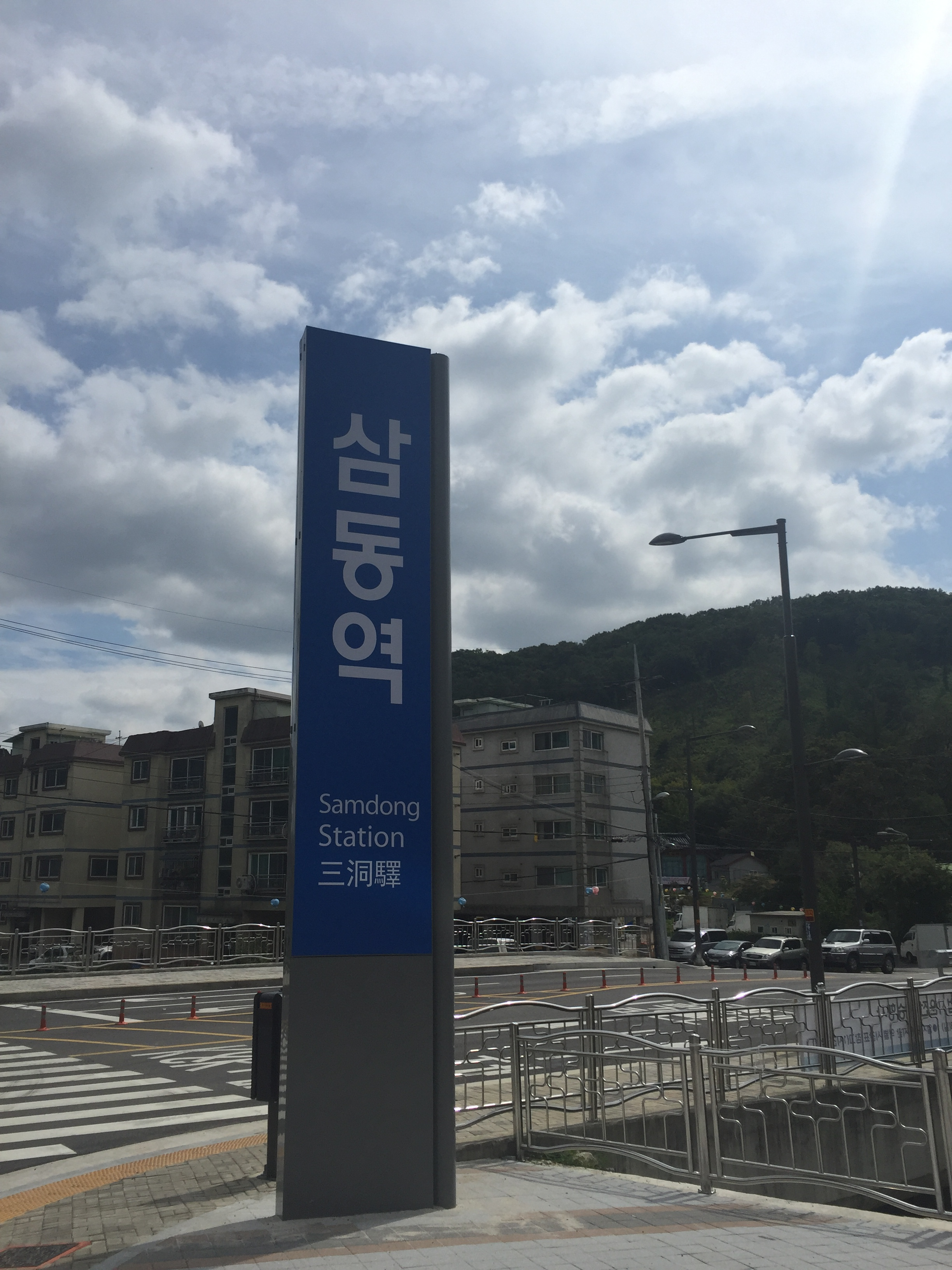 삼동역 외부 역명판 입니다.